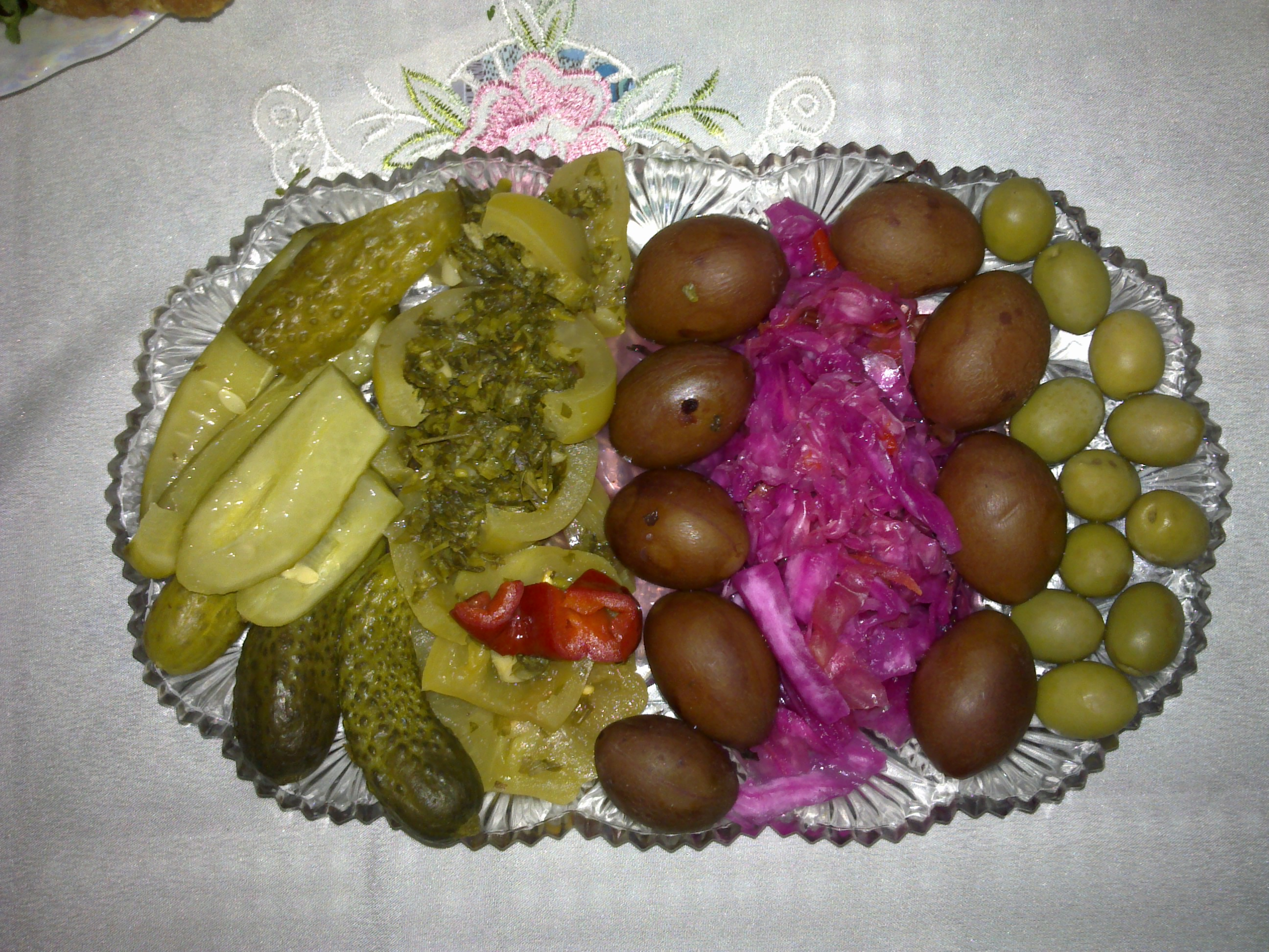 Mənbə: Müəllif